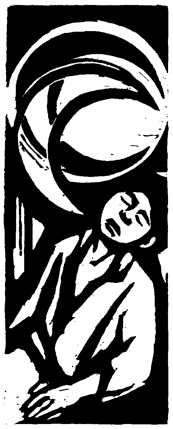 Irena Kuran-Bogucka from Gdańsk, Romancero, woodcut.